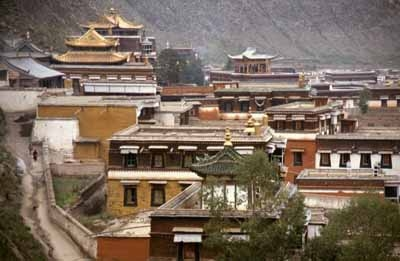 Haupttempel des Klosters Labrang in Amdo Bildquelle: eigenes Foto (Andreas Gruschke) Foto: Andreas Gruschke (Freiburg)